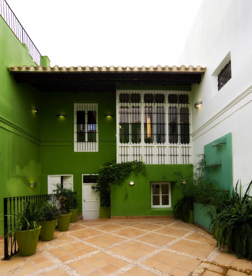 Vista planta superior del edificio desde el patio interior